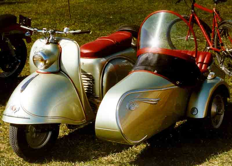 Goggo